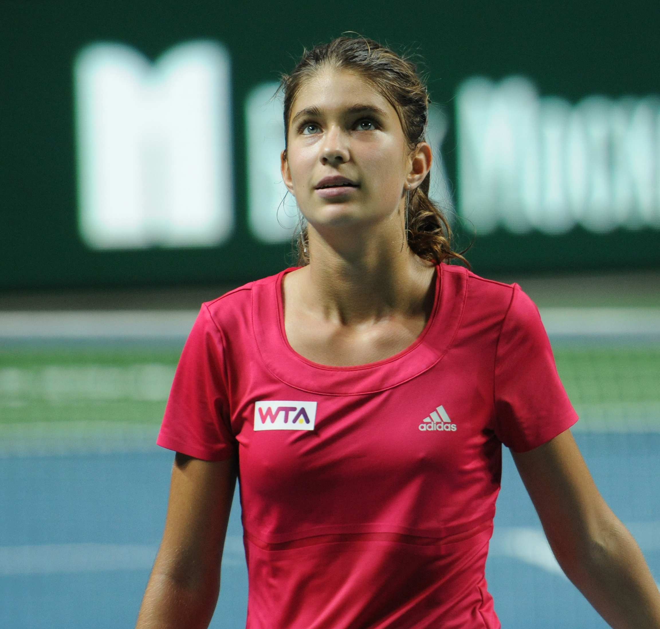 Aleksandra Pospelova at the 2014 Kremlin Cup